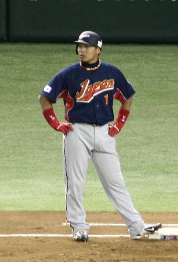 岩村明憲